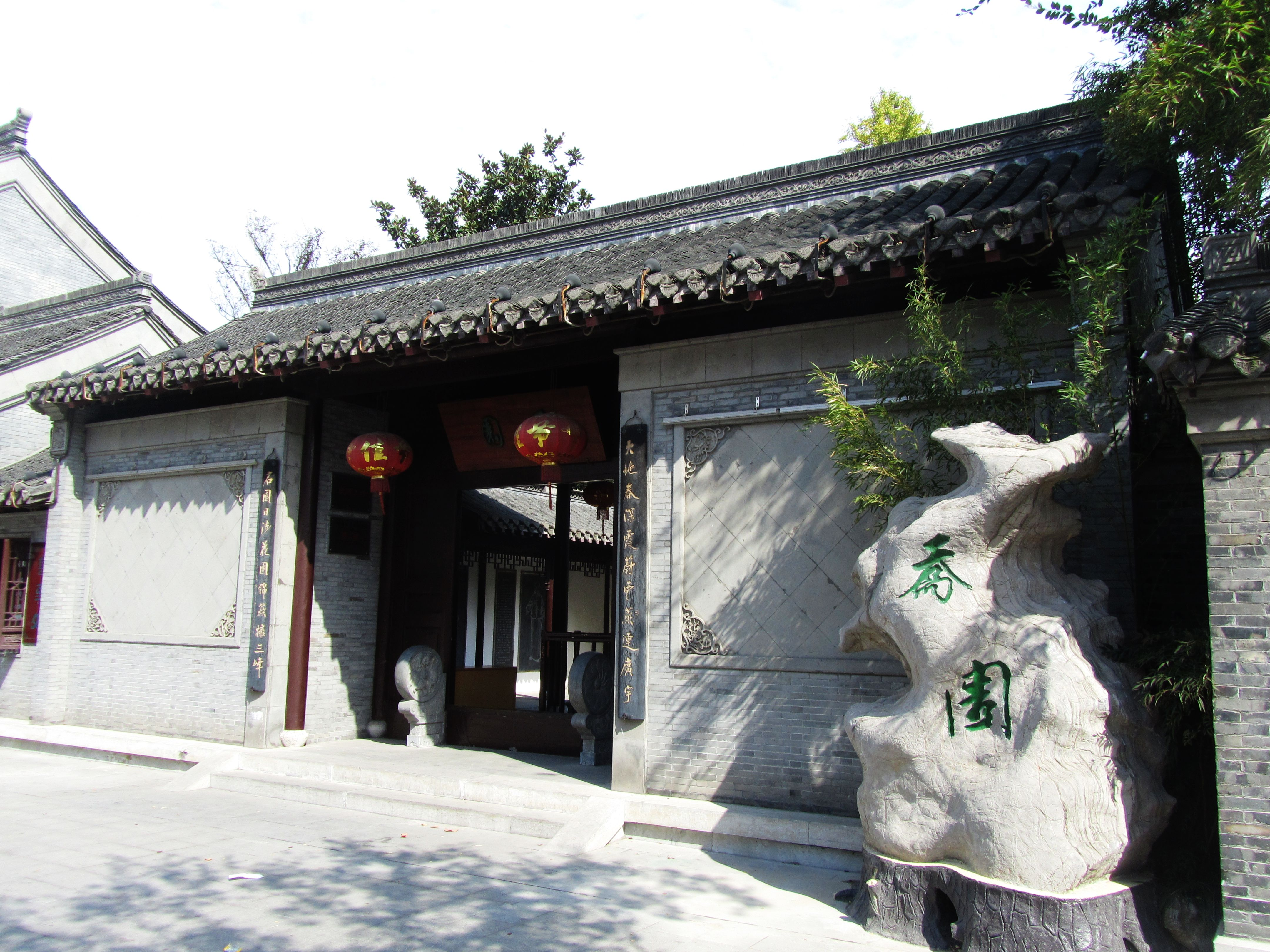 泰州乔园大门。